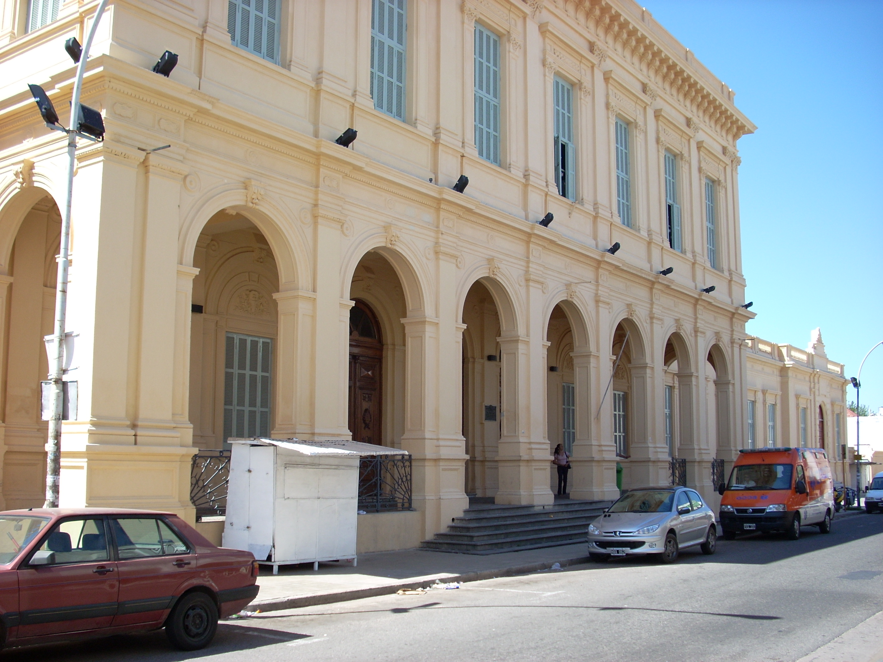 Hospital Nacional de Clínicas, Barrio Alberdi, Córdoba, Argentina.